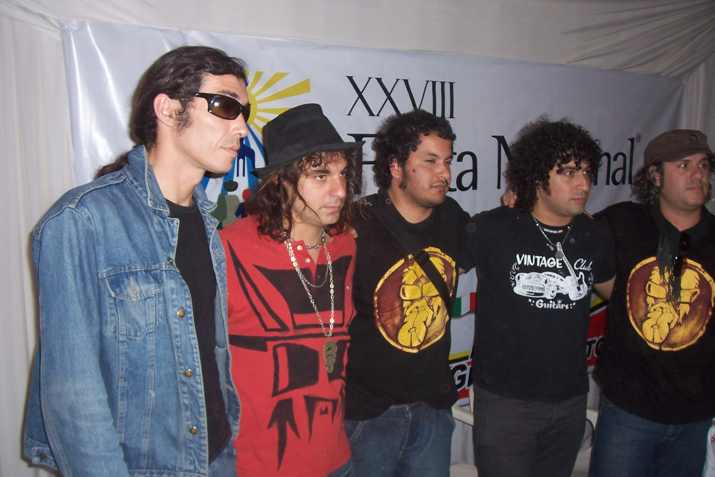 La 25, en la 28º edición de la Fiesta Nacional del Inmigrante en Oberá, Misiones.